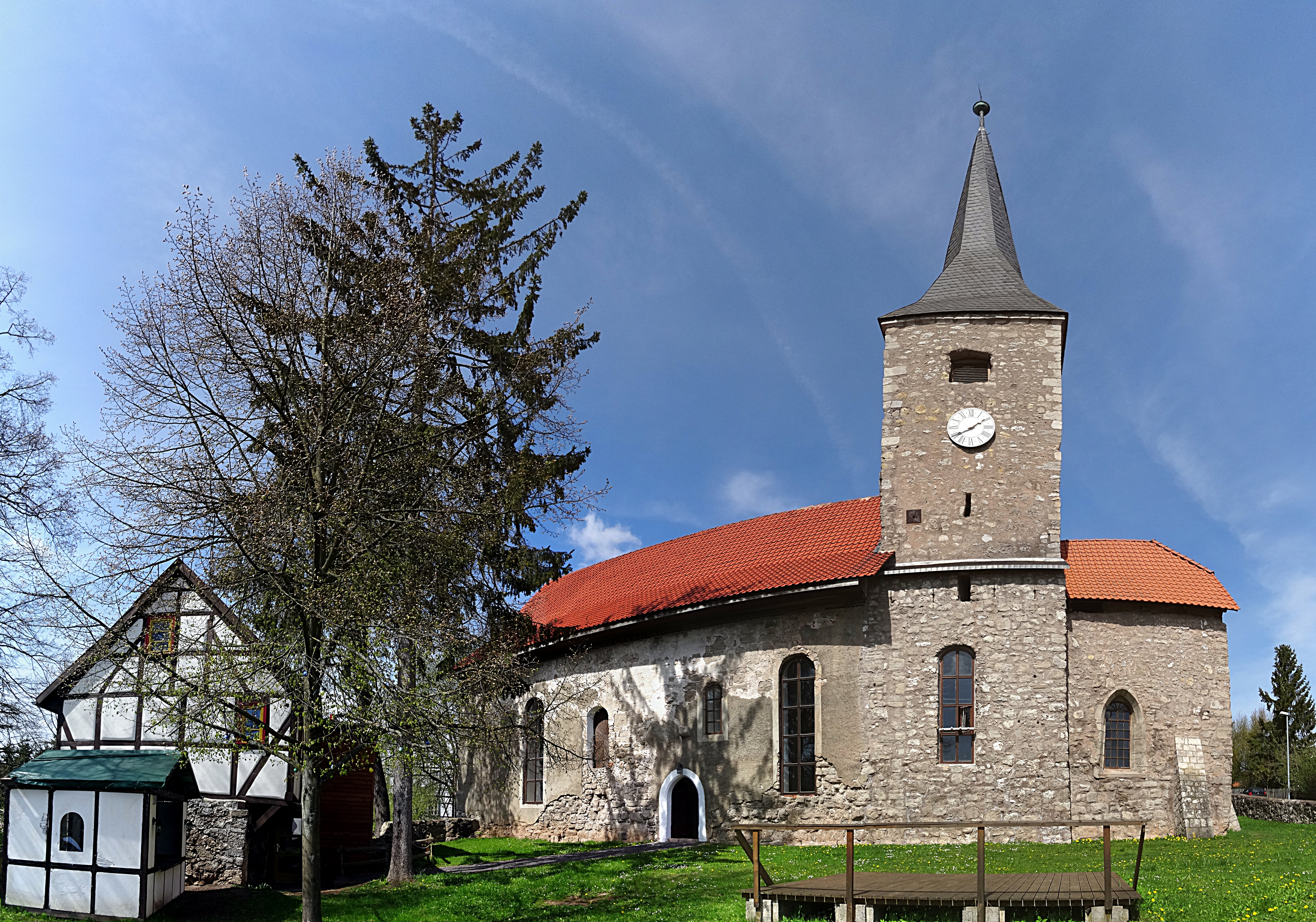 Wehrkirche St. Petri in Liebenrode